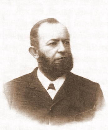 Hermann Fritsche (ur. 20 grudnia 1846 w Bielsku, zm. 8 października 1924 w Białej) – niemiecki teolog, działacz religijny i publicysta, pastor w parafiach w Wiener Neustadt, Bielsku i Białej, przewodniczący wyższych władz Kościoła ewangelicko-augsburskiego w Austro-Węgrzech od 1907 r., superintendent diecezji galicyjsko-bukowińskiej od 1908 r., prezydent dwóch ostatnich przed 1914 r. Synodów Generalnych w Wiedniu, współzałożyciel dwóch czasopism ewangelickich, autor licznych tekstów do kilku pism teologicznych, doctor honoris causa wydziału teologii protestanckiej Uniwersytetu Wiedeńskiego, rycerz Orderu Żelaznej Korony i komtur Orderu Franciszka Józefa.